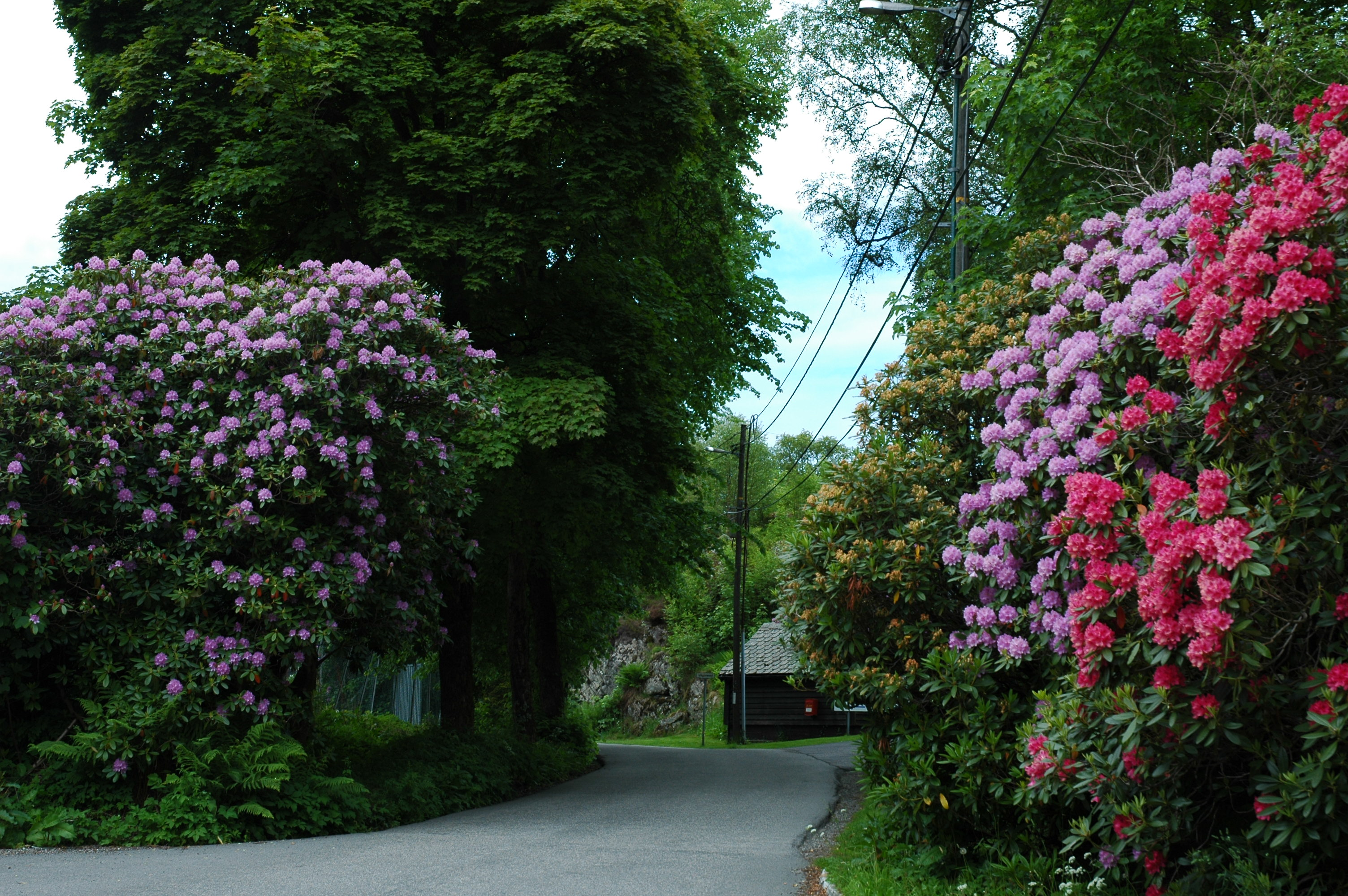 Rododendron i blomstring 2006